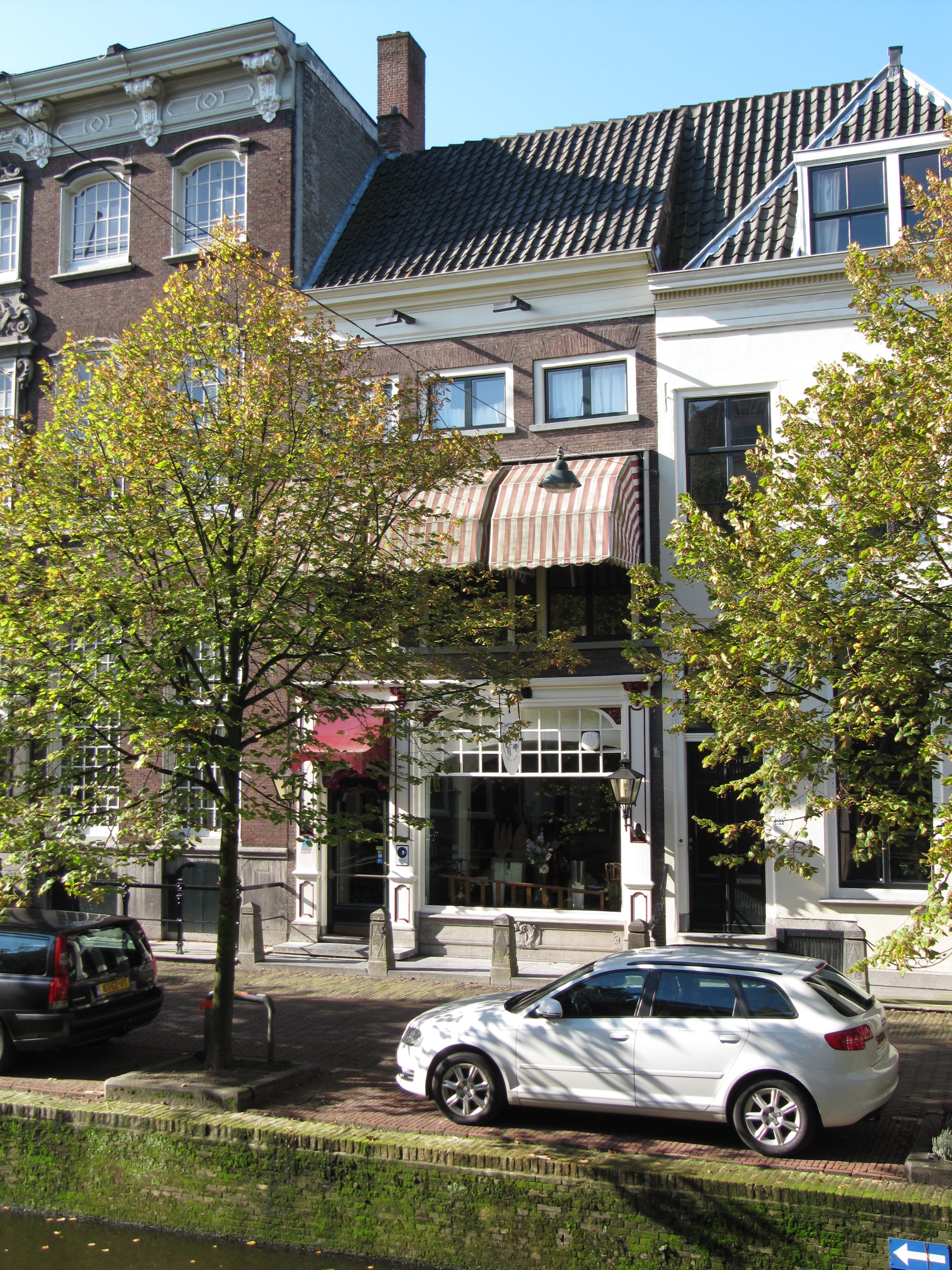 RM12010 Delft - Oude Delft 125.jpg